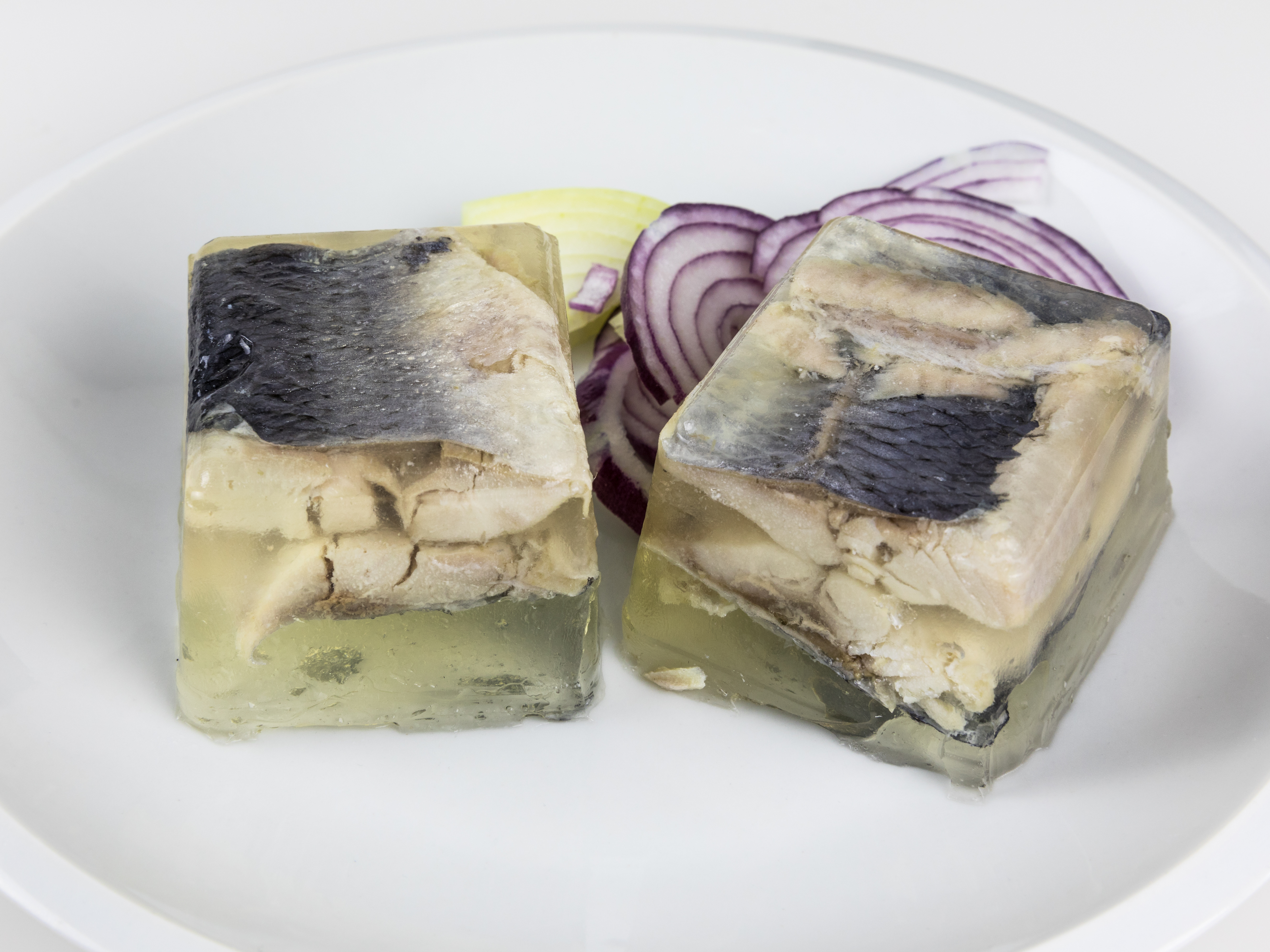 Hering in Gelee (Schweinegelatine), Nadler Feinkost